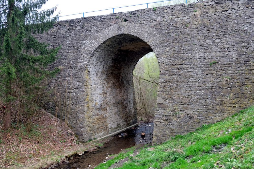 Kamenný most